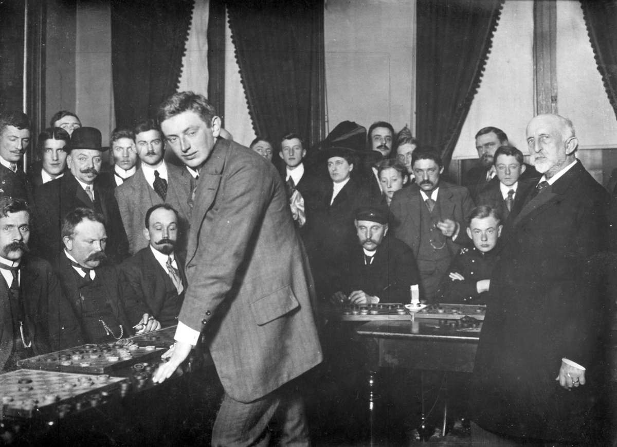 Dammen historie. De wereldkampioen in het dammen Herman Hoogland Jr bij het simultaanspel 1912.